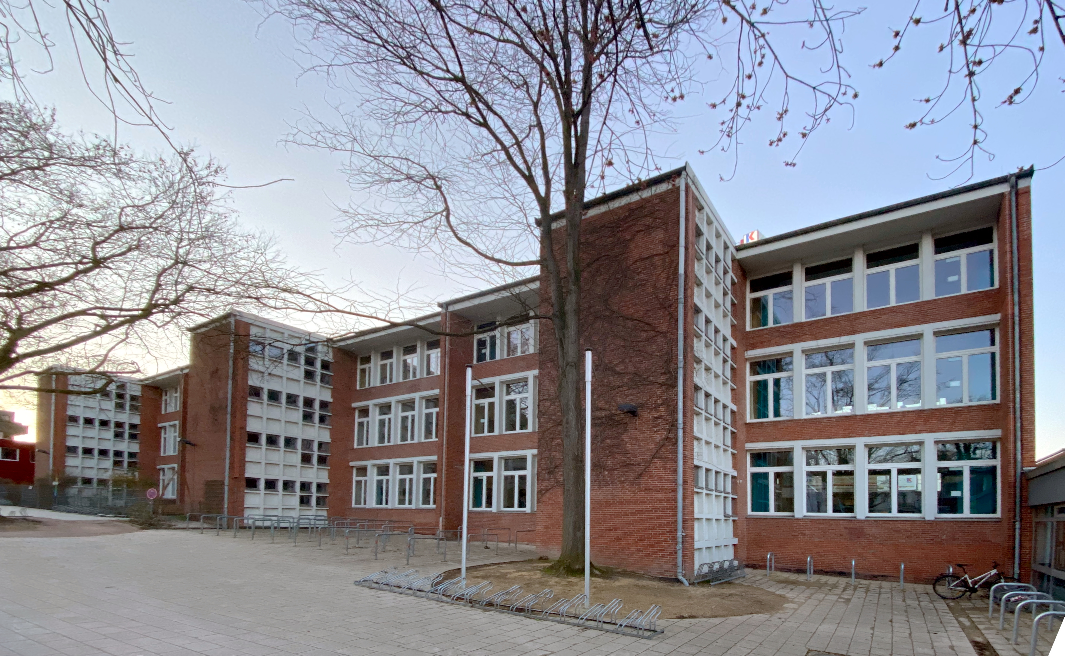 Wilhelm-Gymnasium in Hamburg-Harvestehude, Unter- und Mittelstufentrakt